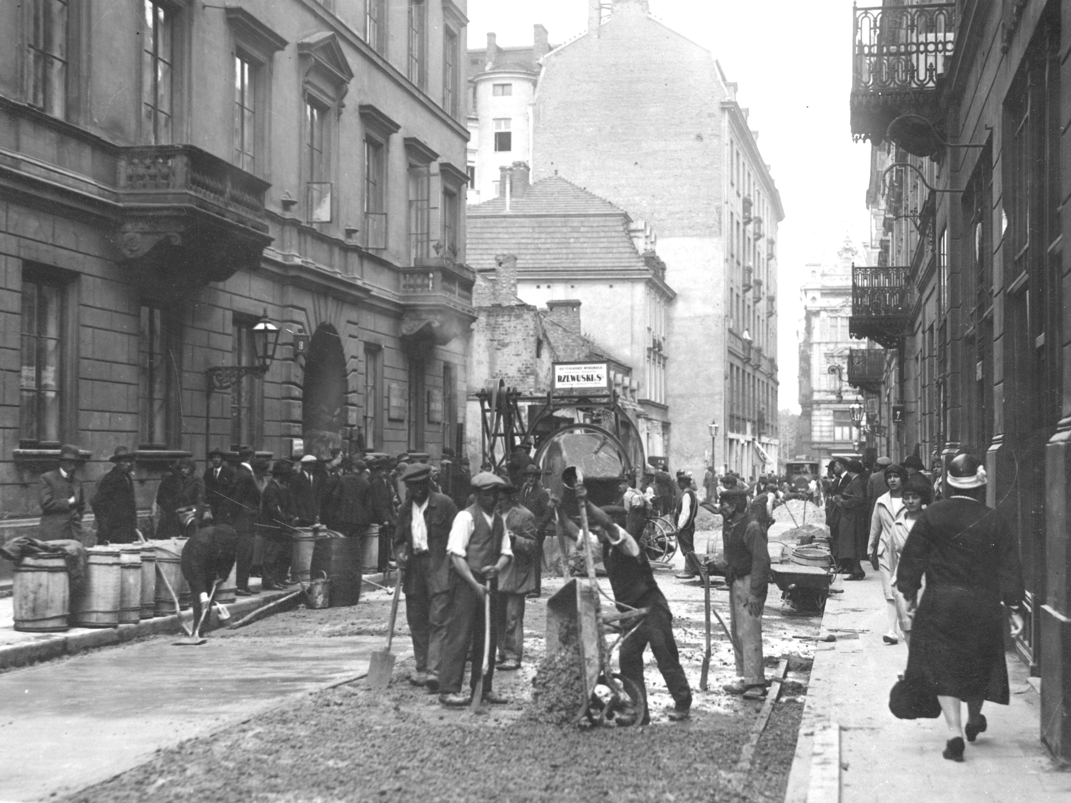 Asfaltowanie ulicy Chmielnej w Warszawie